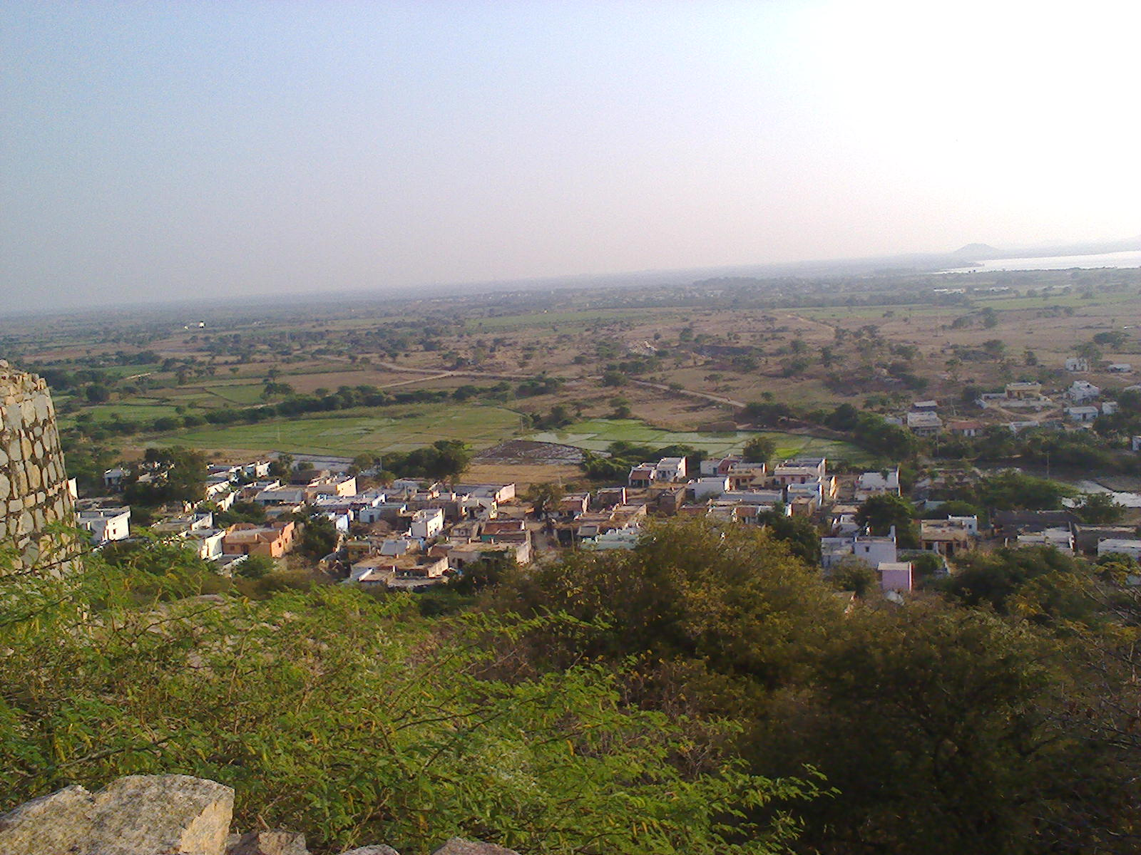 చంద్రగఢ్ కోటపై నుండి గ్రామ చిత్రం